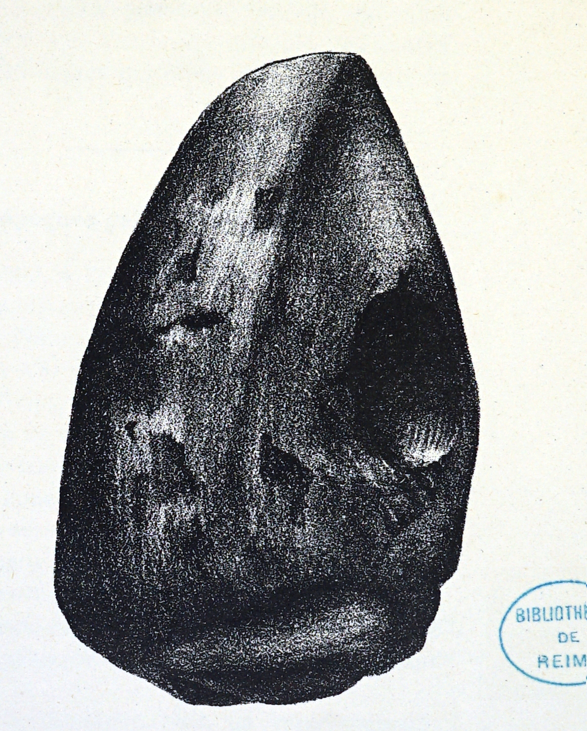 extrait du livre.